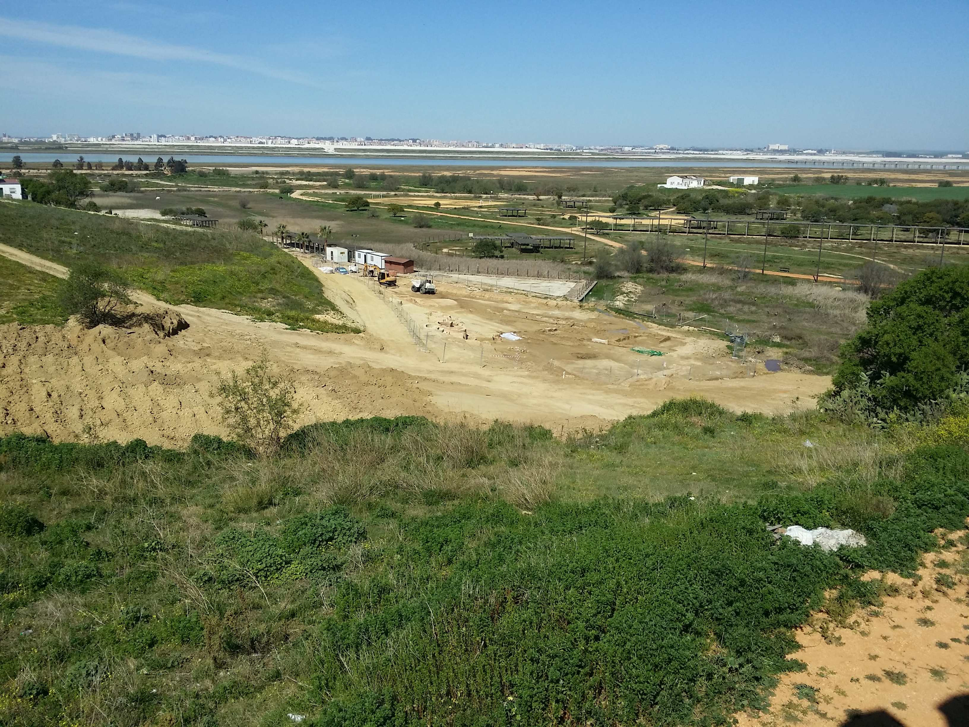 Puerto de Palos. Huelva. España.